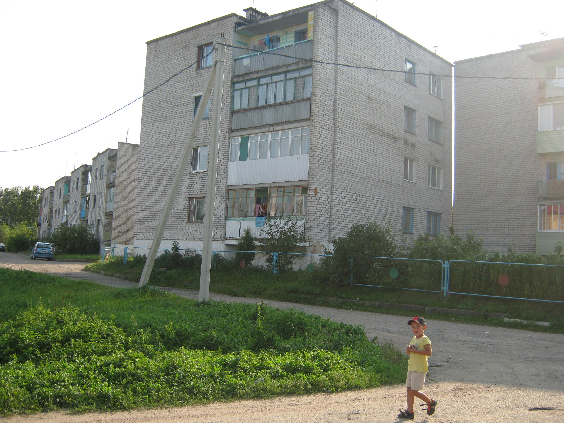 орилпотпорп